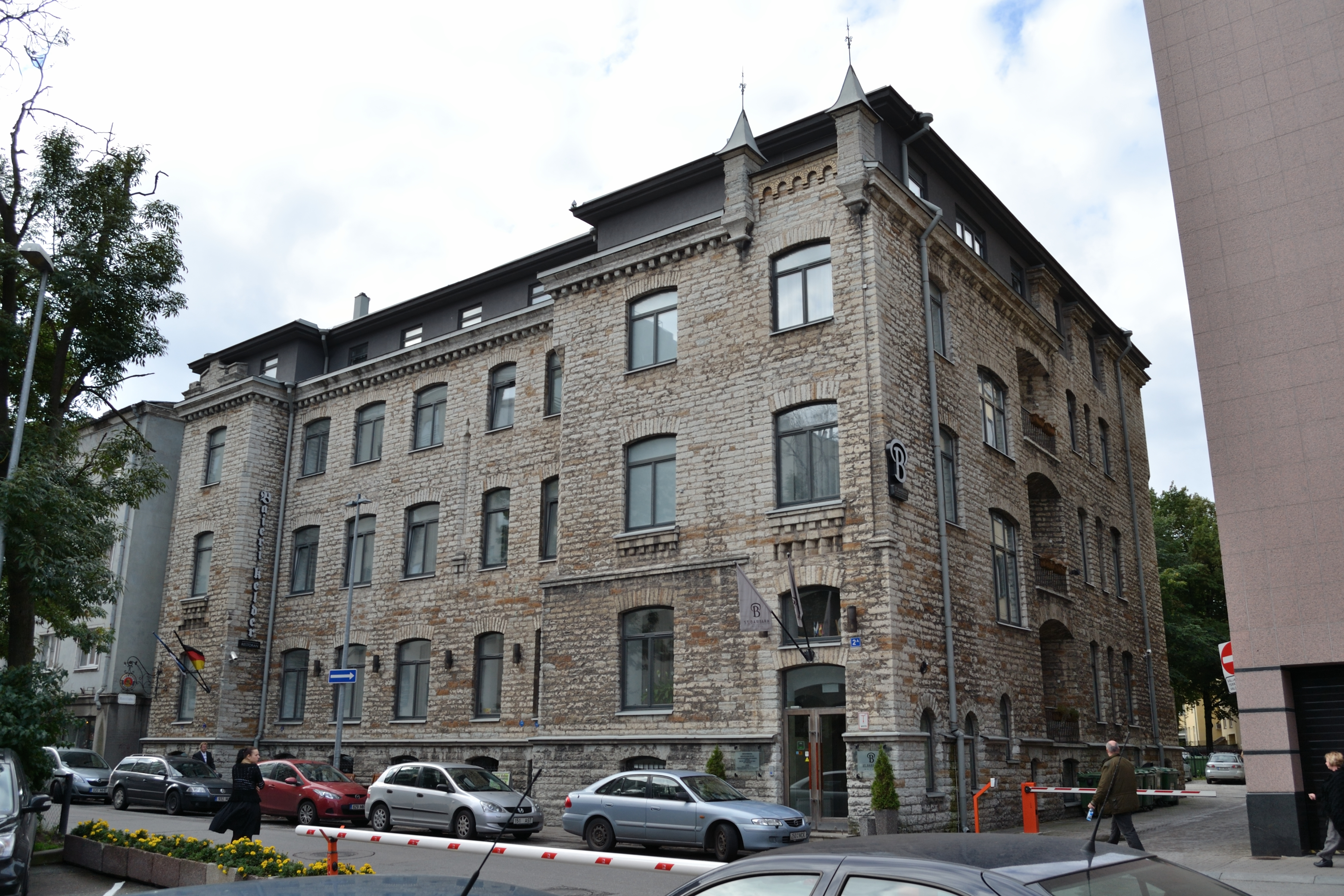 Tallinn, haiglahoone Roosikrantsi 2A fassaadid, 1904